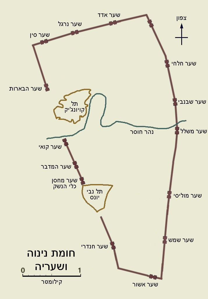 חומת נינוה ושעריה